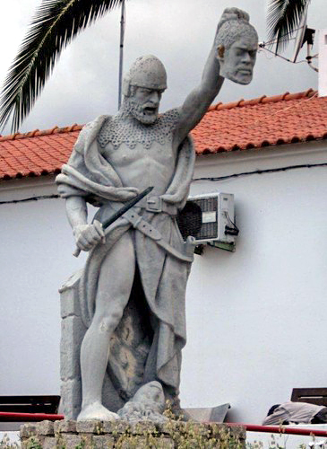 Geraldo Geraldes o Sem Pavor. Estatua localizada em Évora.